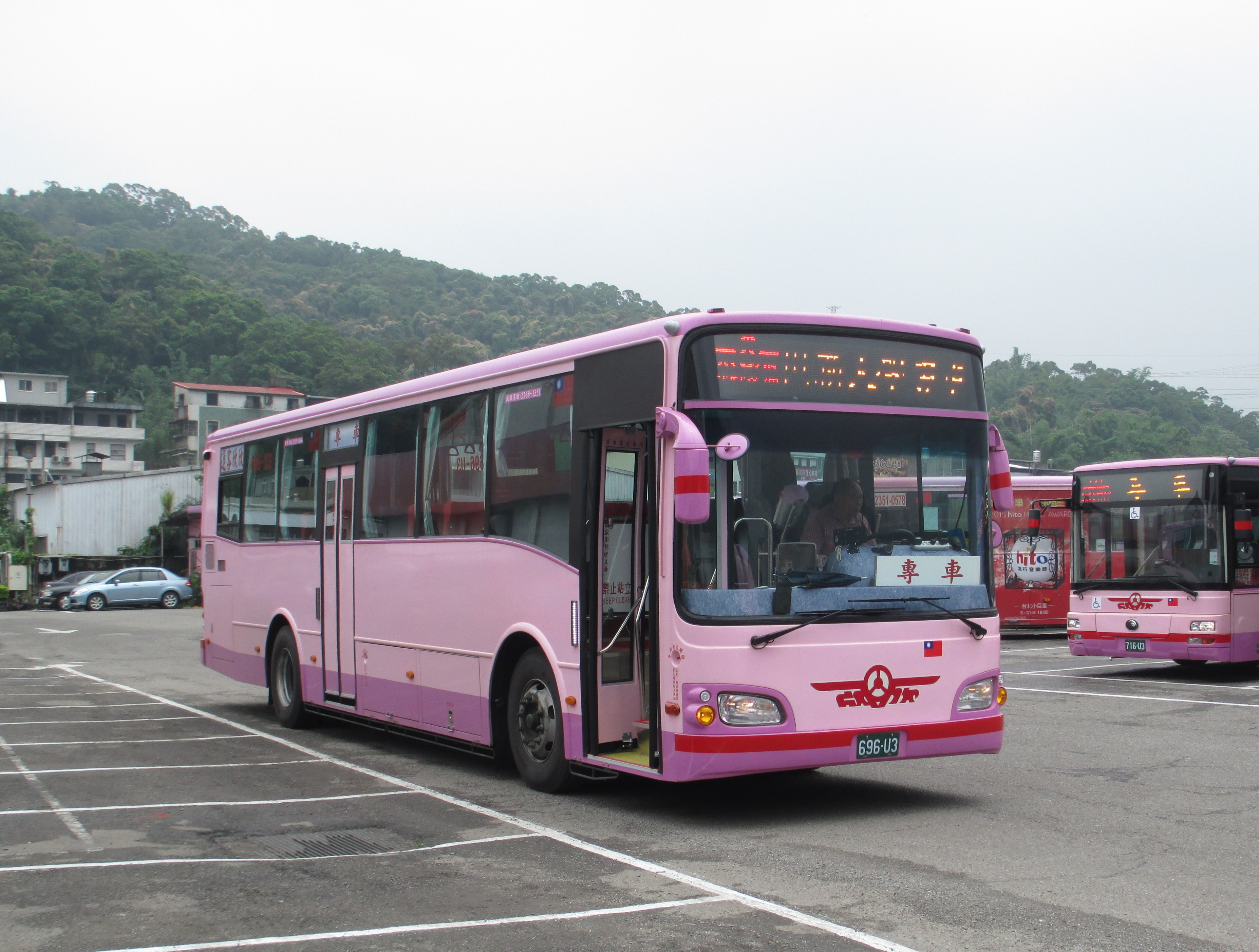 欣欣客運2015年HINO RK8JRVA-KJF固亞車體大客車696-U3。